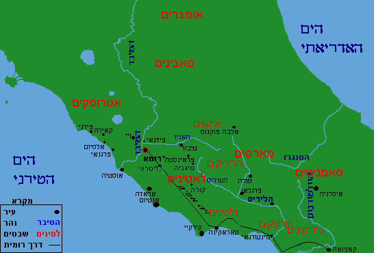 מפה לא מדויקת של לאטיום וסביבותיה בעת העתיקה. המפה מציגה את לאטיום, דרום אטרוריה, קאמפניה הצפונית וחלקים נוספים במרכז איטליה העתיקה. המפה נוצרה על בסיס W:Image:Rome dot.png ולפיכך אינה פוגעת בזכויות יוצרים. המידע במפה מתבסס בחלקו על תולדות הרפובליקה הרומית של ישראל שצמן ועל אטלס גיאגראפי אוניברסיטאי של פרופסור משה ברור, הוצאת יבנה.